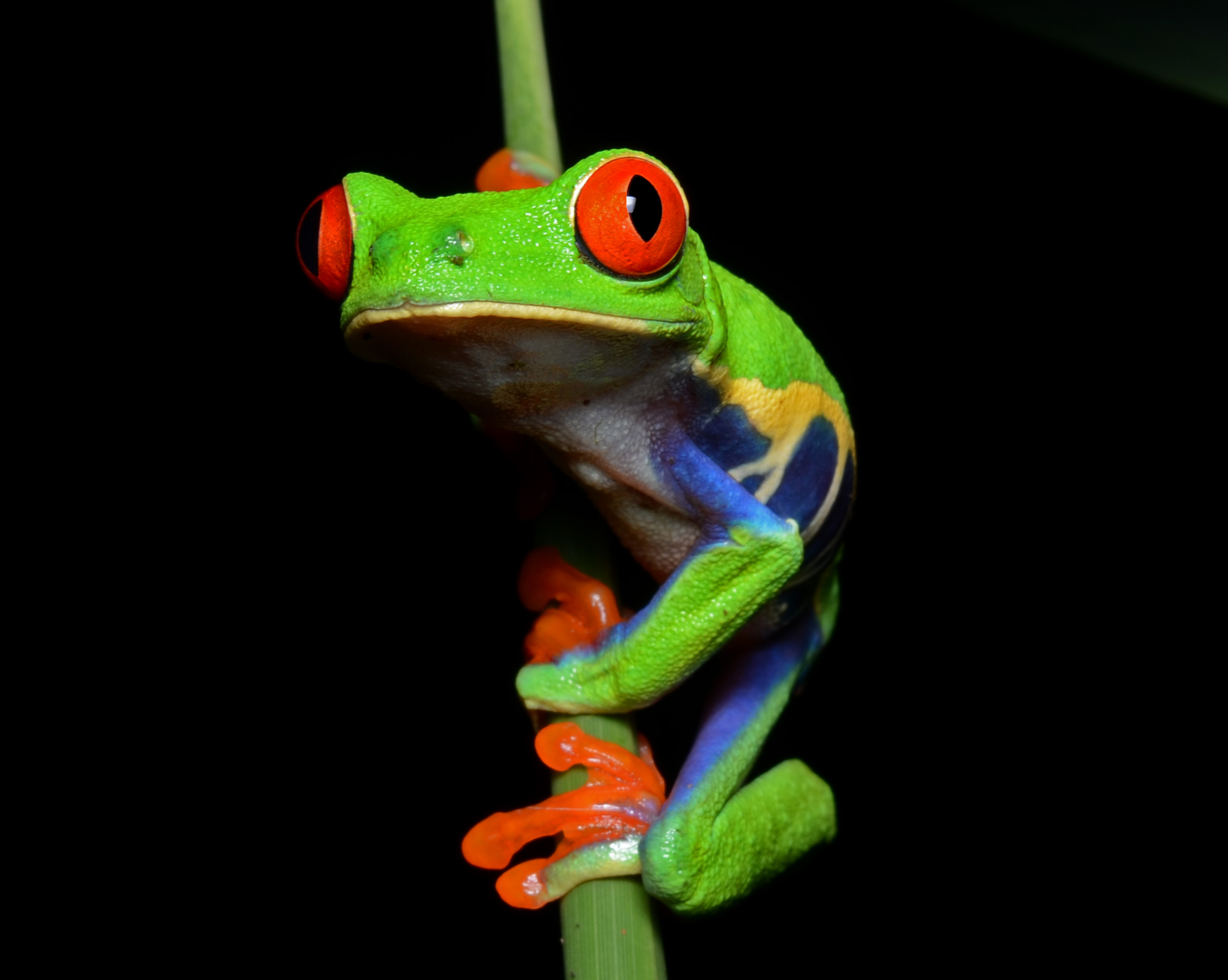 Hylidae: Agalychnis callidryas